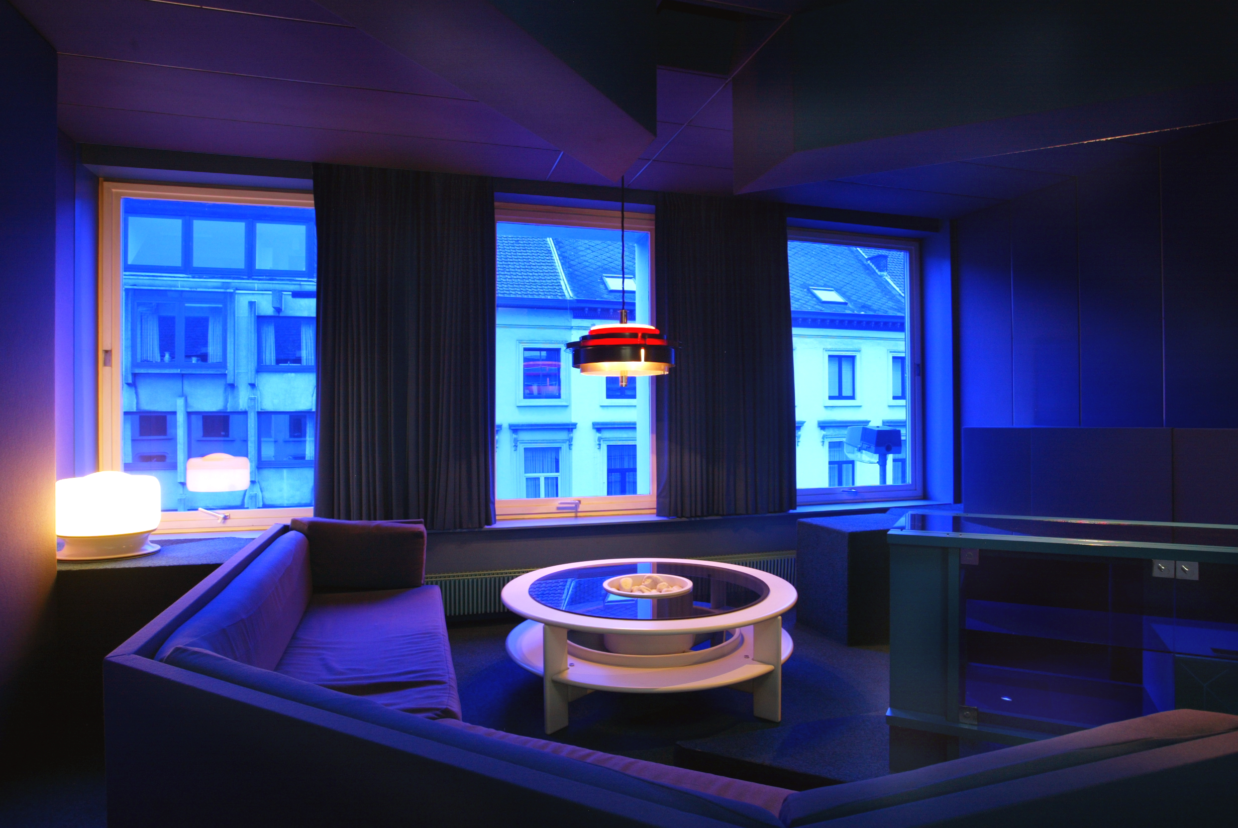 Architectenwoning Pieter De Bruyne te Aalst